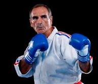 Dominique VALERA en position de garde